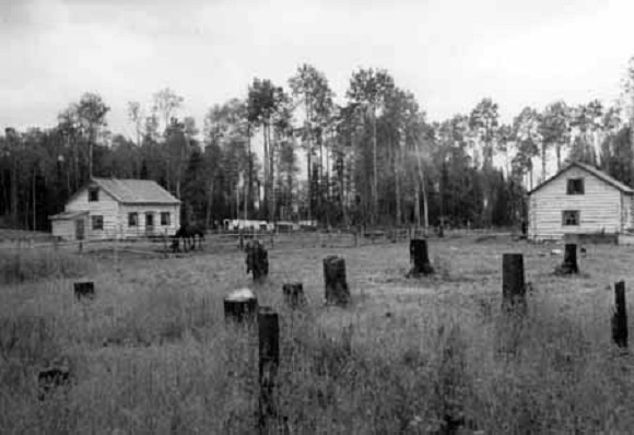 Image du film En pays neufs